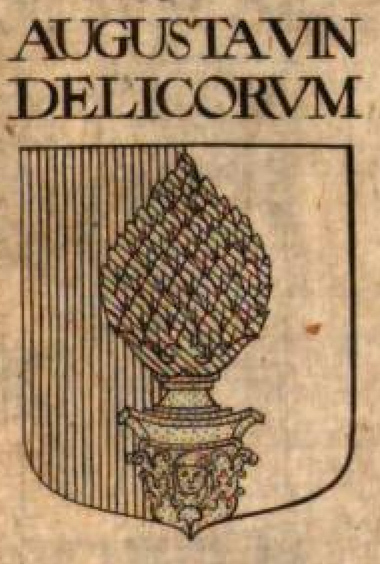 'Wappenbuch. 2. Circulus Suevicus. Schmuck, Strassburg c. 1680. Wappen der Stadt Augsburg